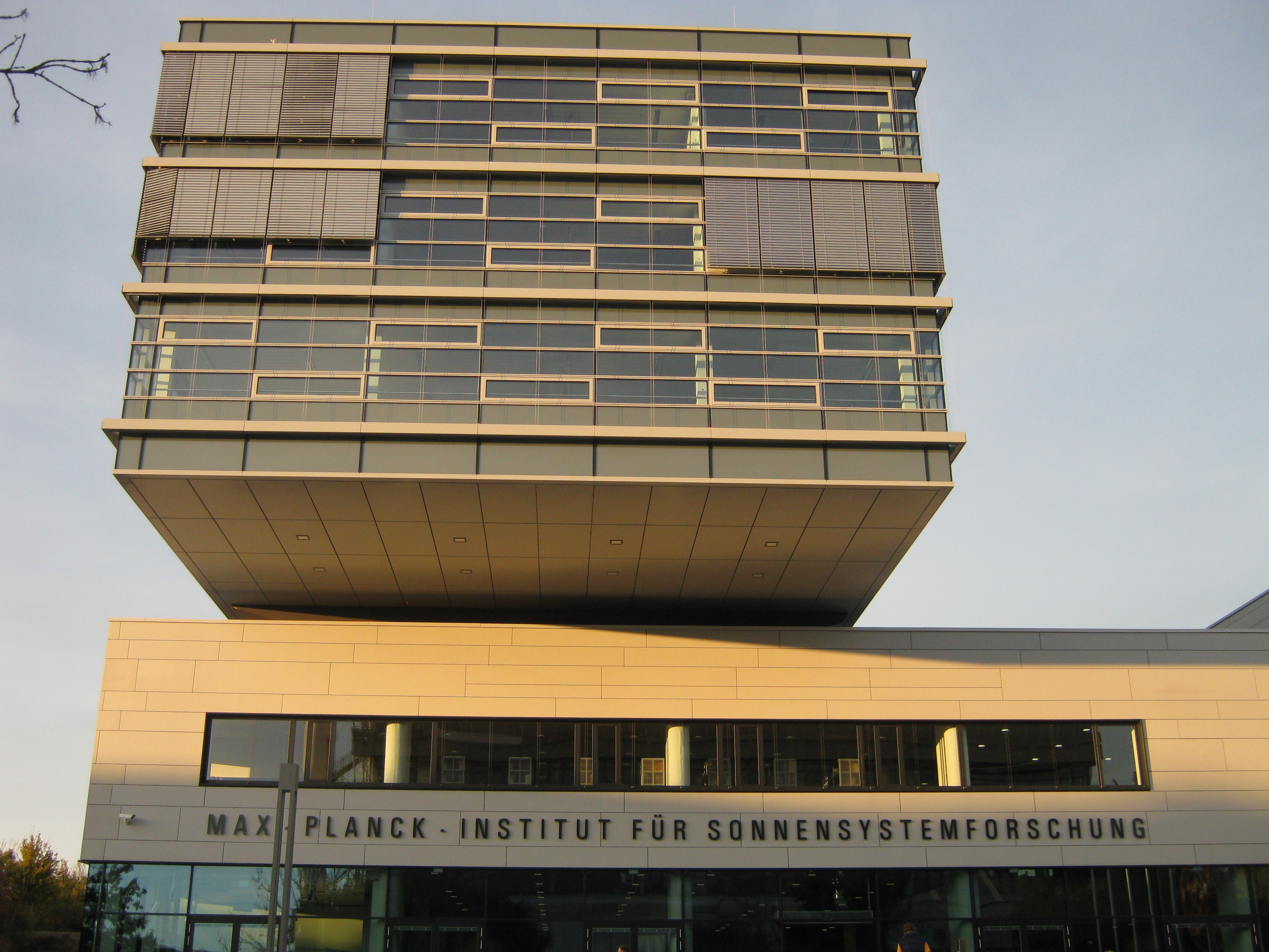 Max-Planck-Institut für Sonnensystemforschung in Göttingen, Justus-Liebig-Weg 3